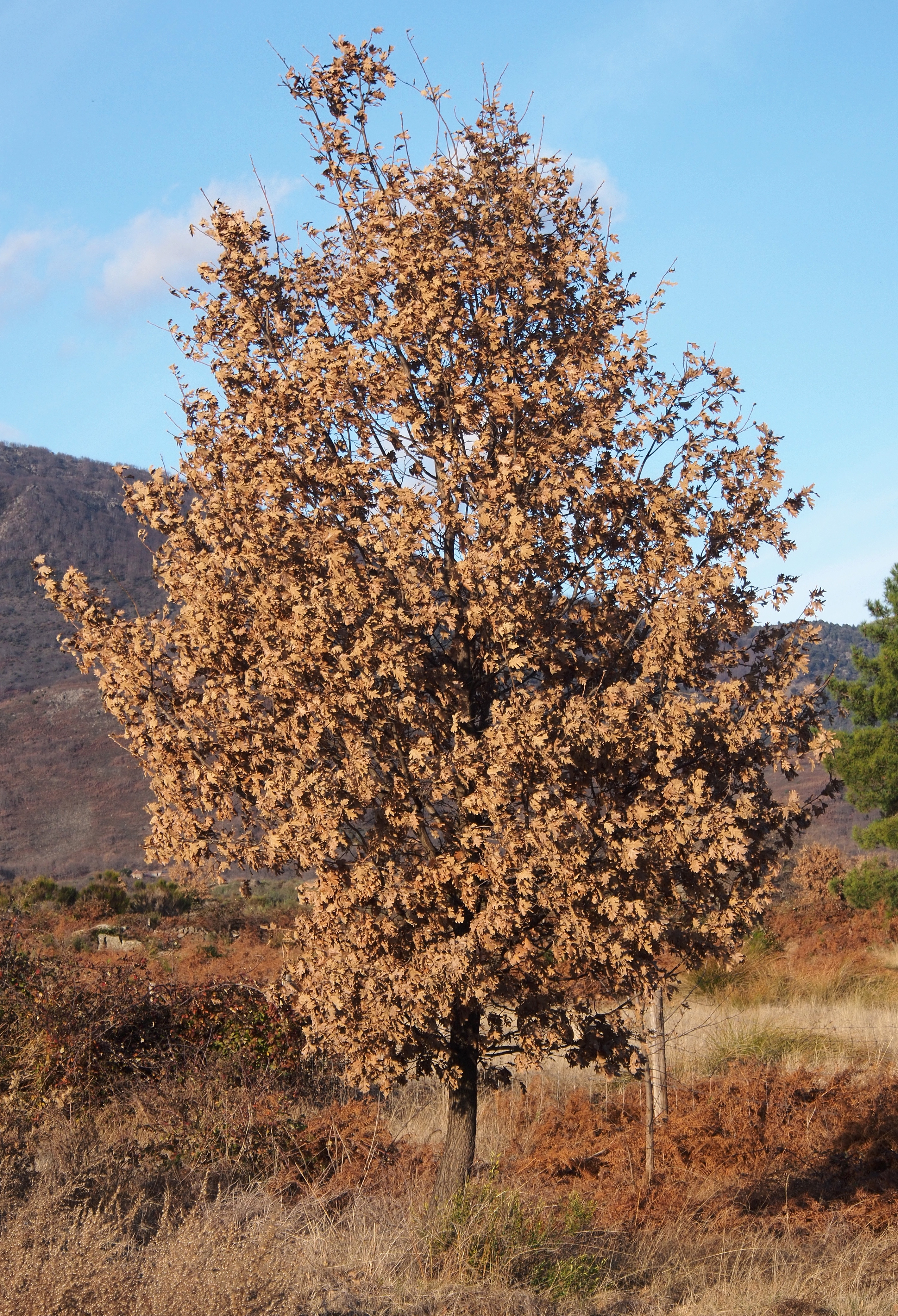 Quercus pyrenaica. Marcescencia de ejemplar joven, que conserva las hojas, marchitas, pasado ya el solsticio de invierno. Losar de la Vera (Cáceres, España).